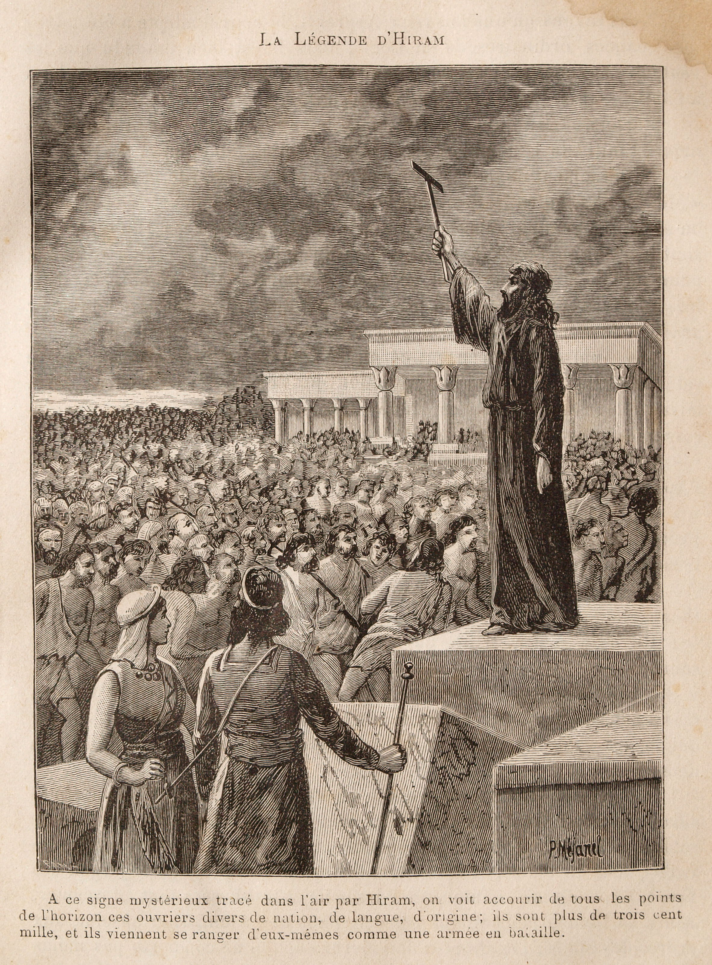 Une des gravures du document de Léo Taxil, Les Mystères de la Franc-Maçonnerie, Paris, 1886.